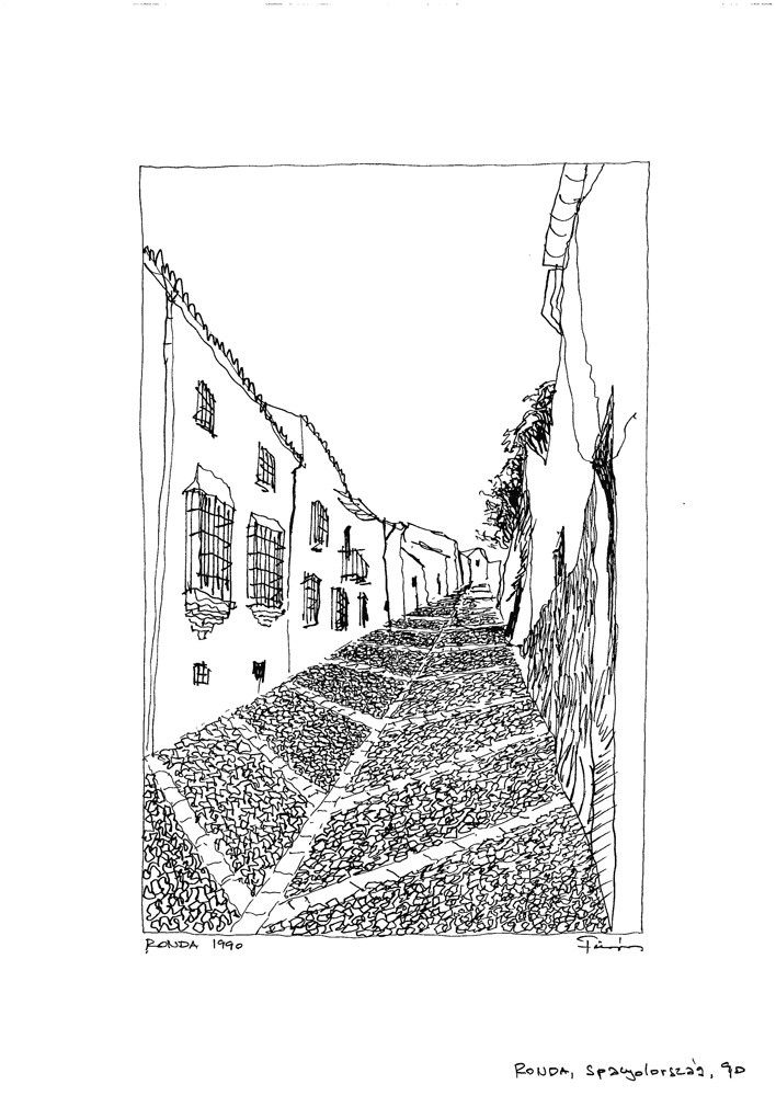 Ronda, Spanyolország (útirajz)